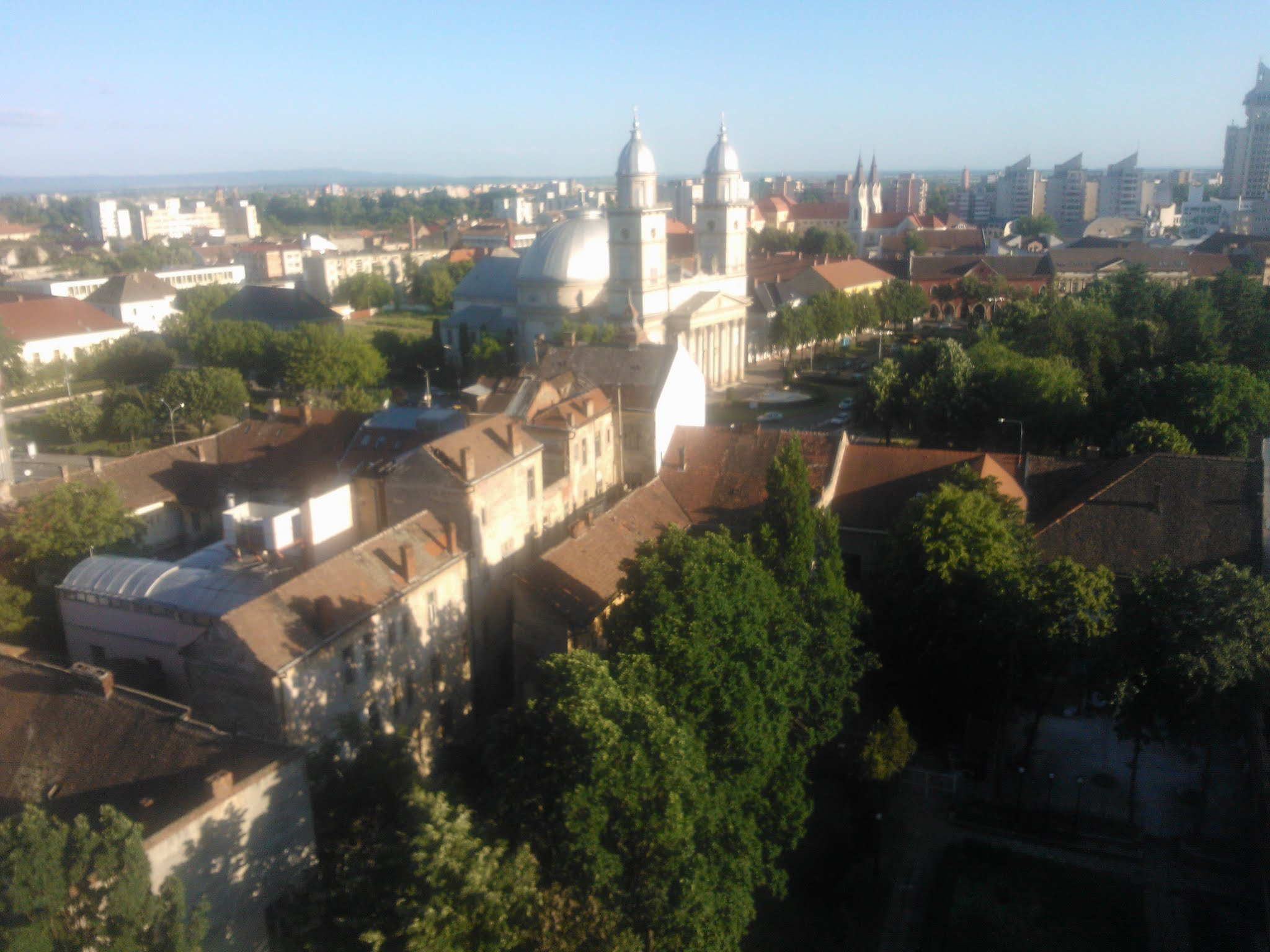 Szatmárnémeti 2013